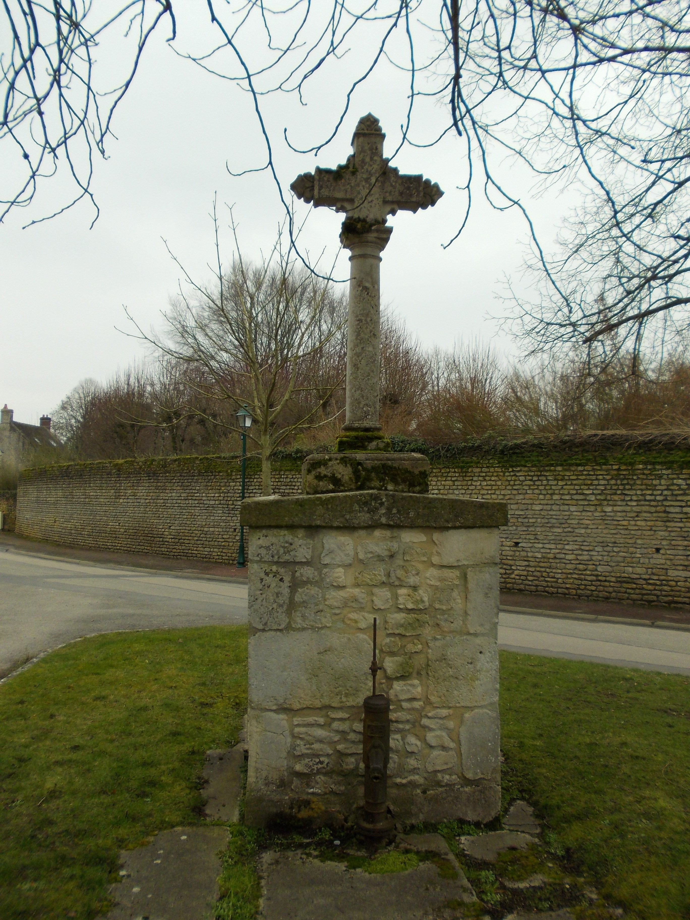 puits surmonté d'une croix , on dit qu'il est construit à l'emplacement d'une mare qui guérissait certaines maladies